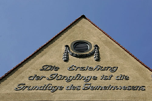 Biel: Die Erziehung der Jünglinge (Gymnasium Alpenstrasse)